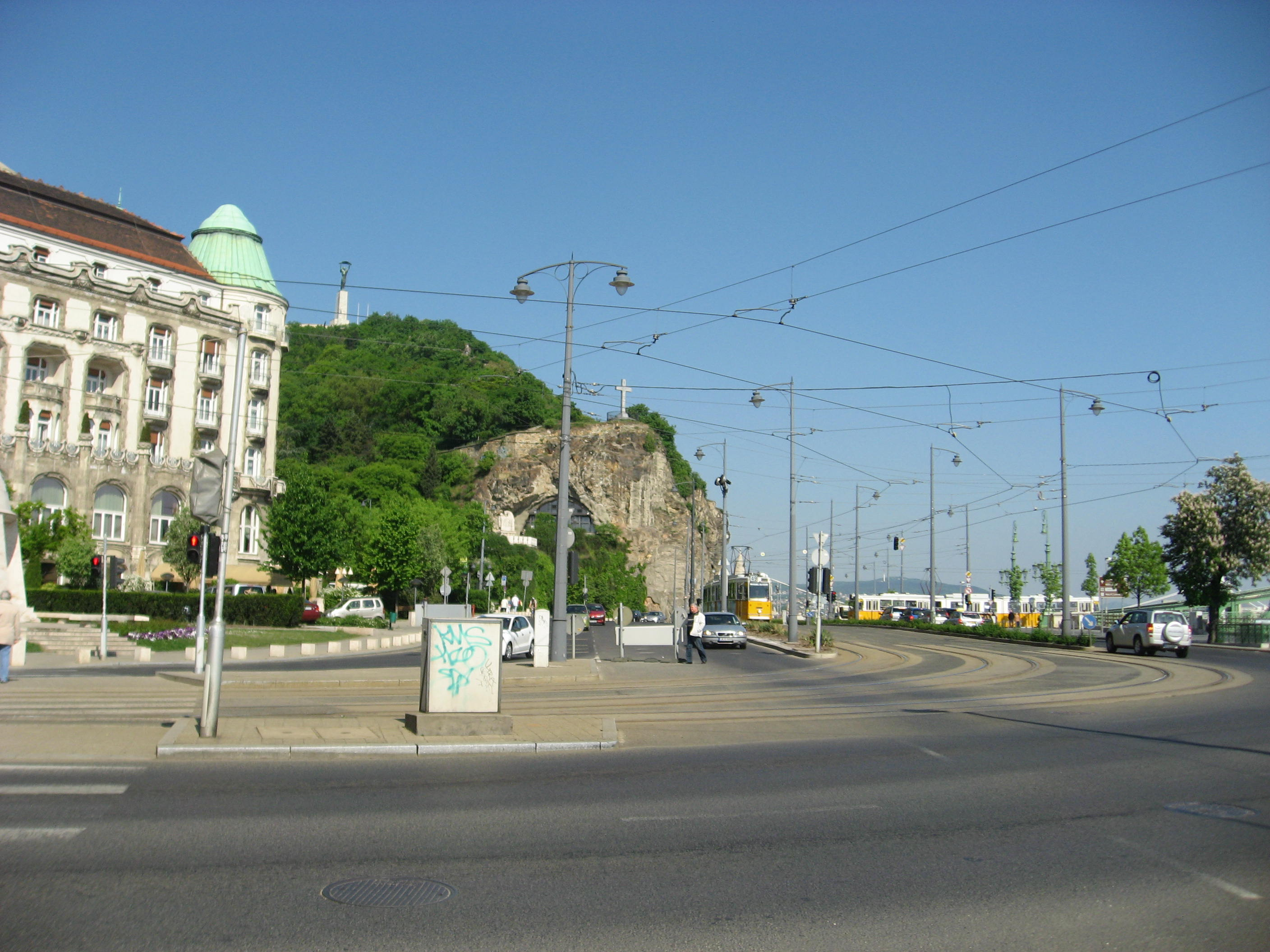 Budapešť